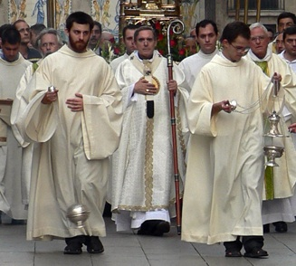 Detall dels acòlits ala processó del Corpus Christi a Barcelona (Av. Portal de l'Àngel) celebrada el 18 de juny de 2006.